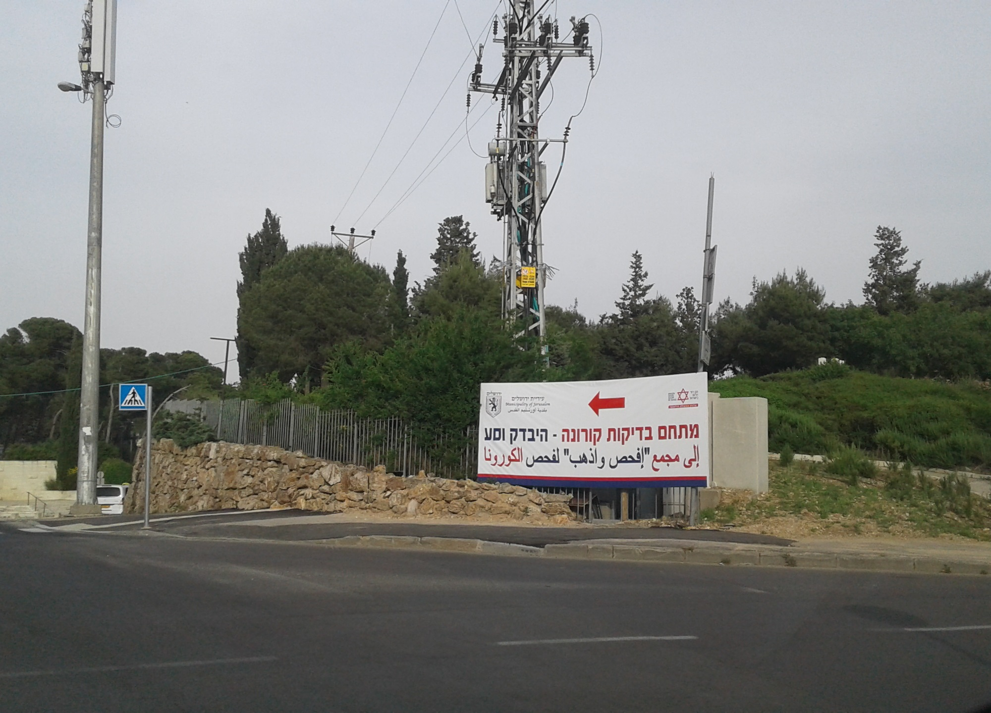 מתחם בדיקות קורונה - "היבדק וסע", של מד"א, בשכונת ארמון הנציב בירושלים